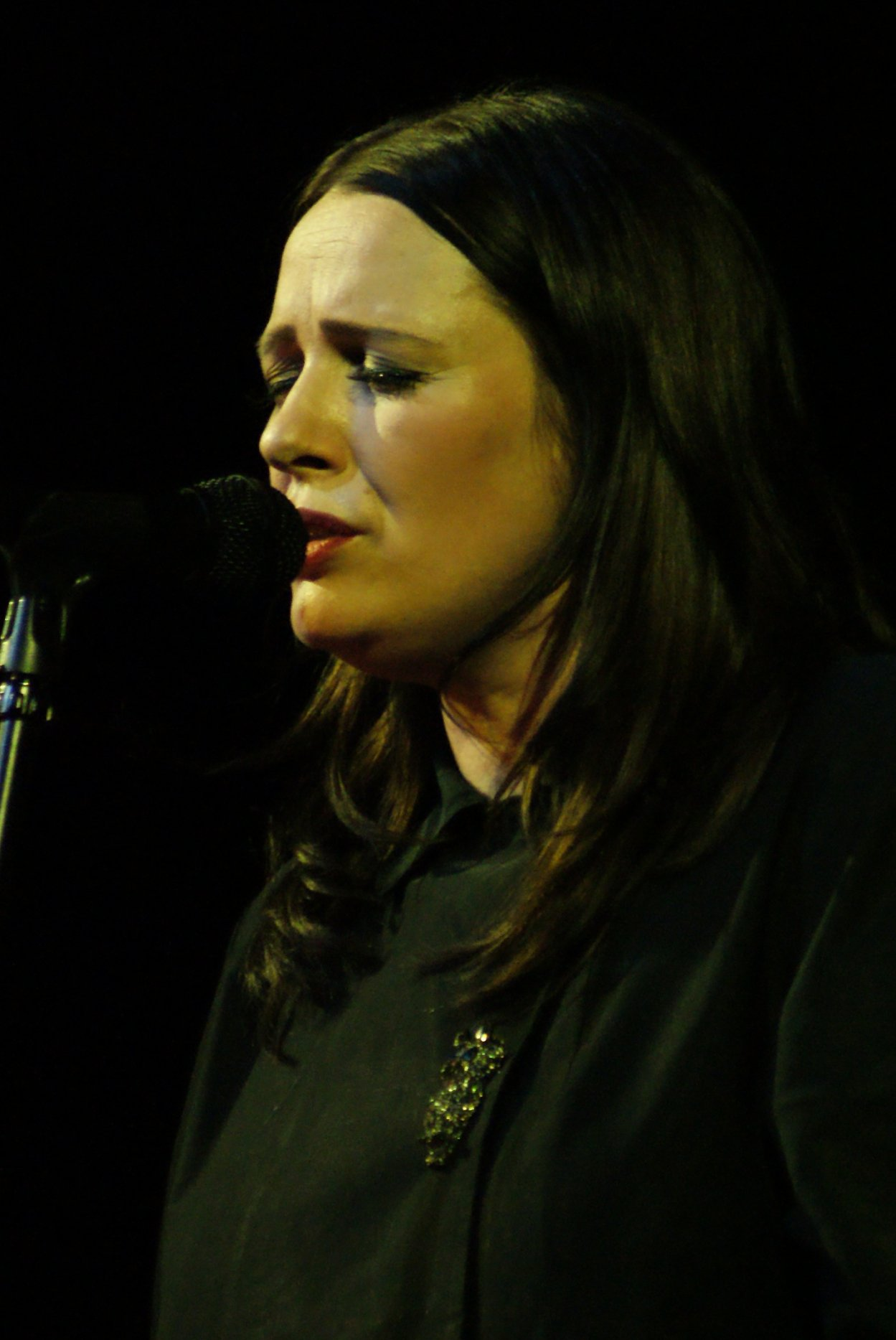 Kasia Nosowska